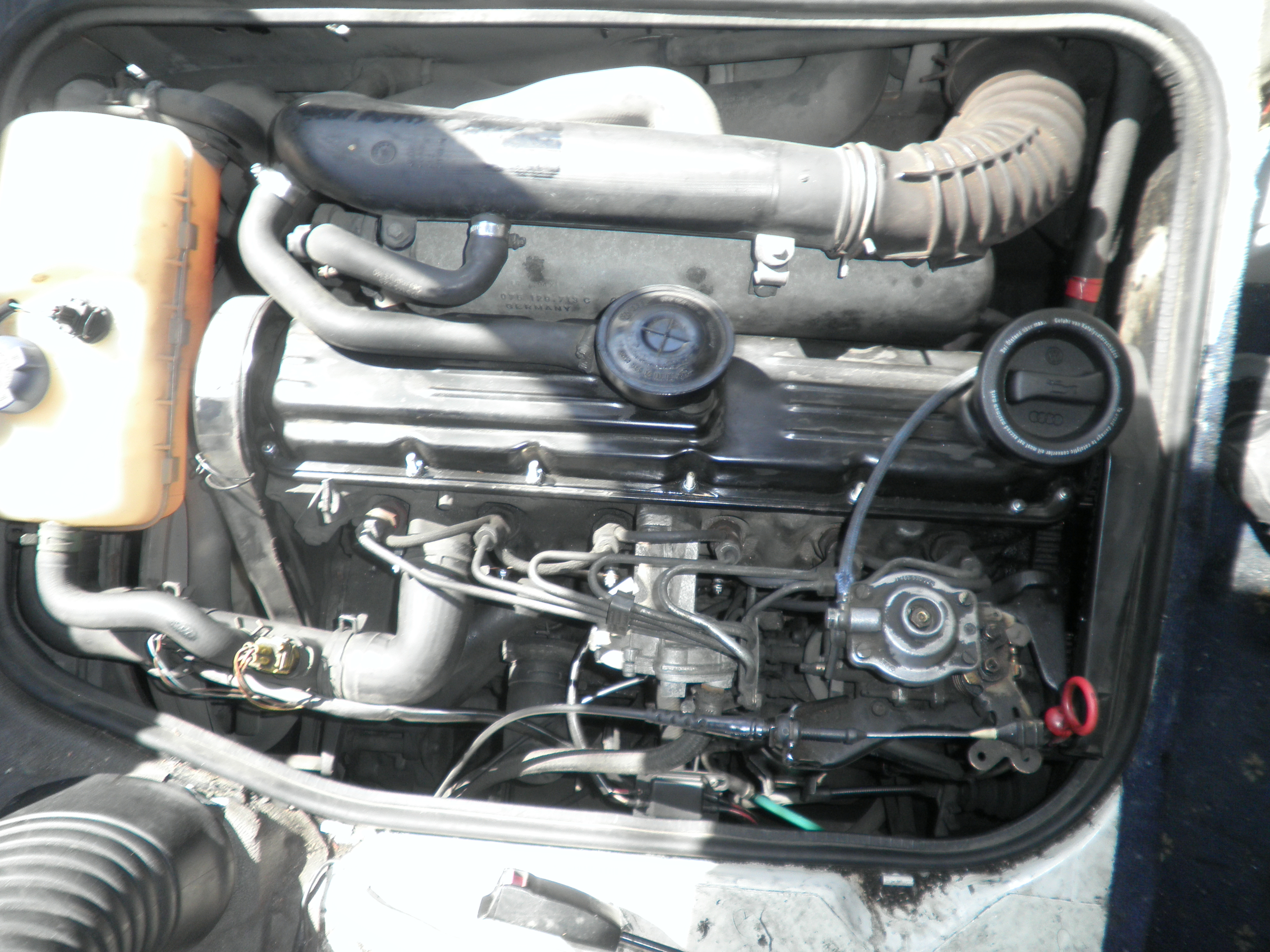 VW LT 35 1994mod. 2,4 ACL